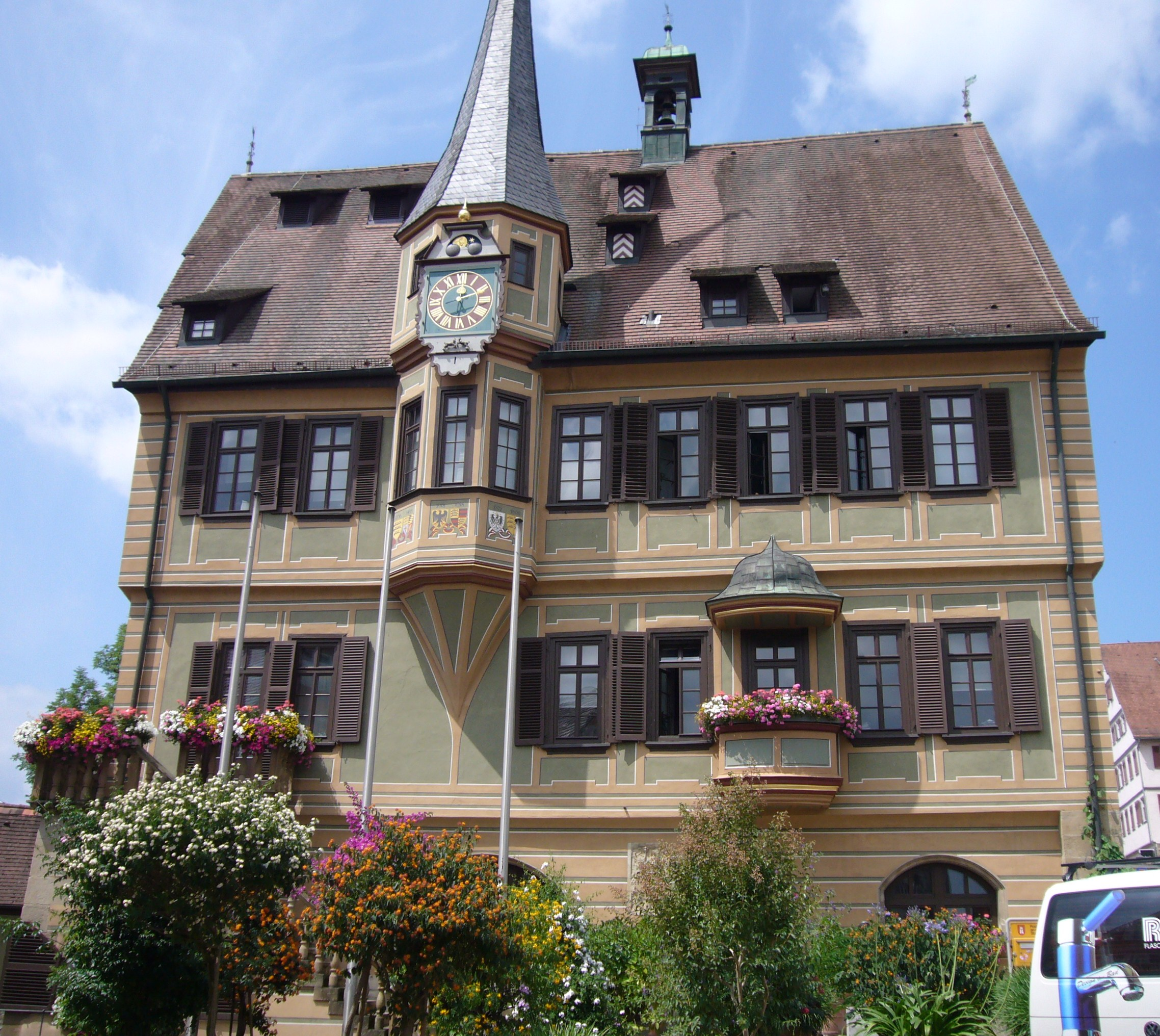 Rathaus von Bietigheim-Bissingen (Stadtteil Bietigheim)